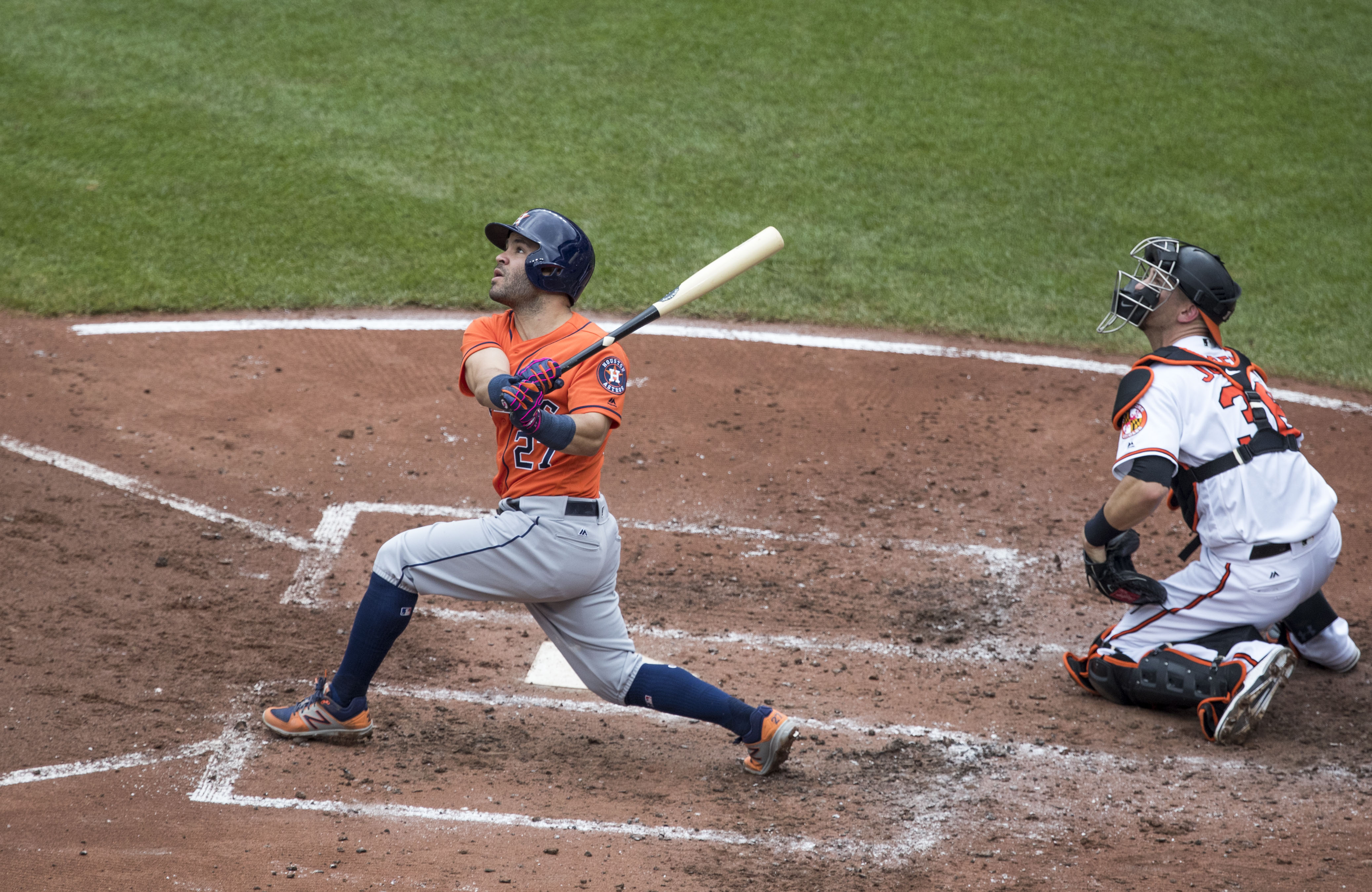 Astros at Orioles 7/23/17